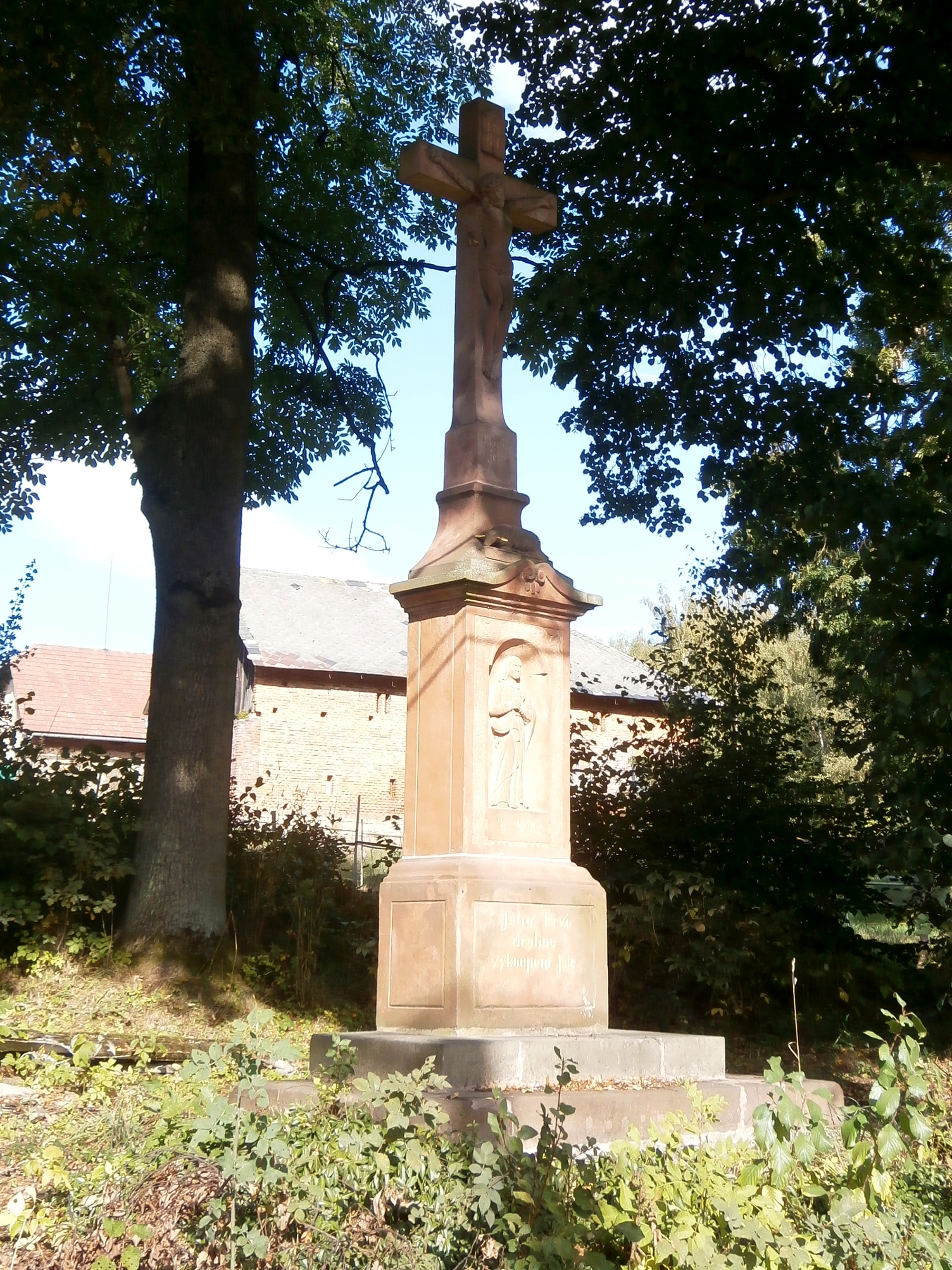 Kříž nedaleko obecního úřadu